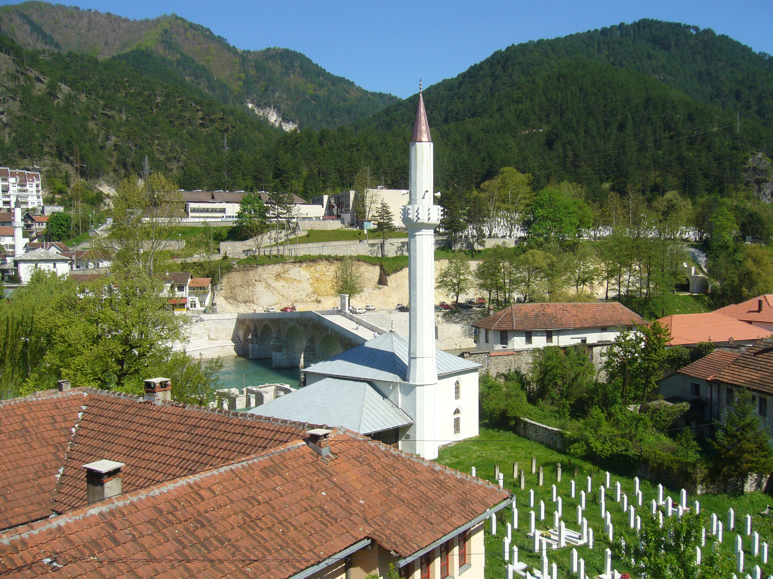 Kamena ćuprija